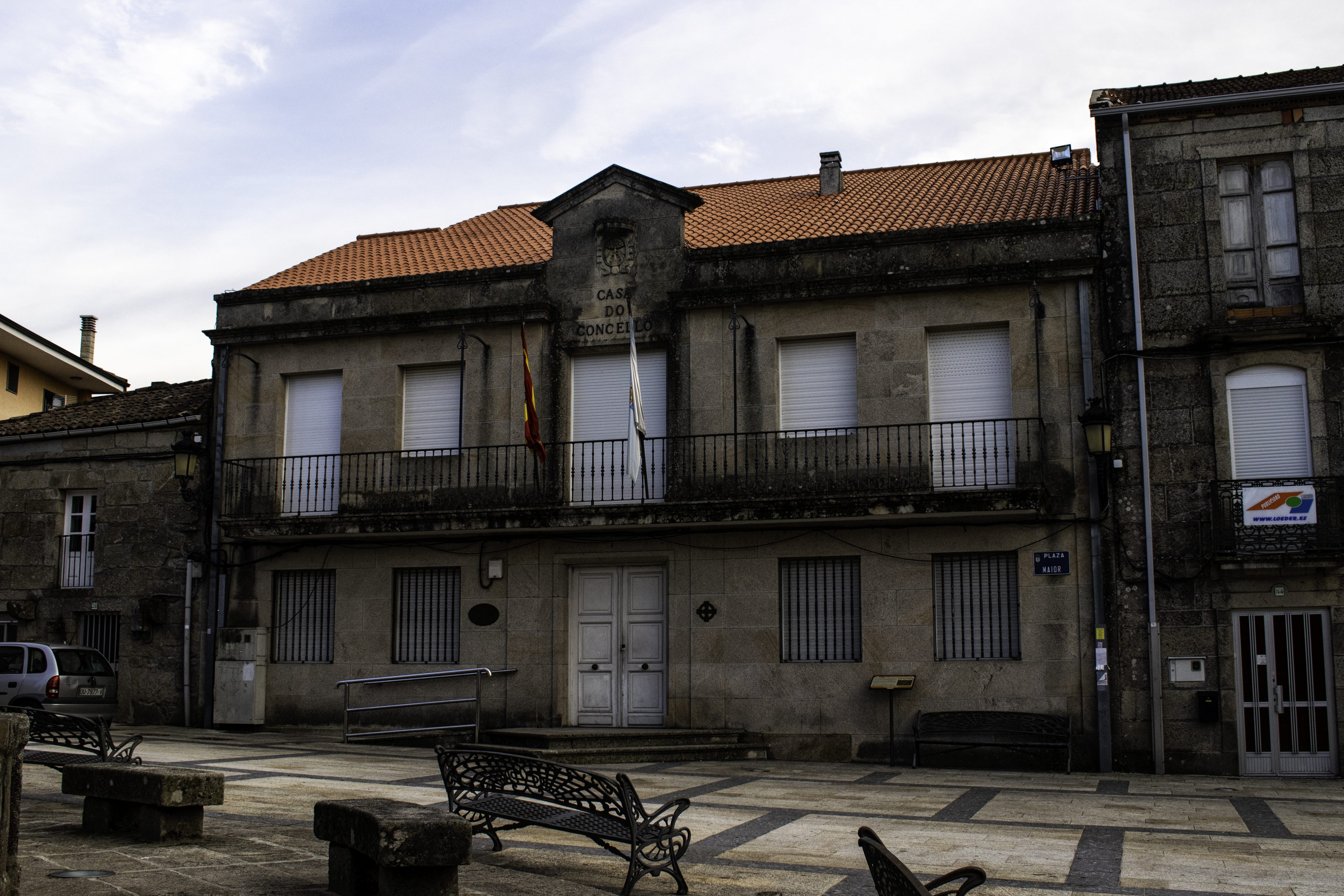 Casa do concello de San Cristovo de Cea.